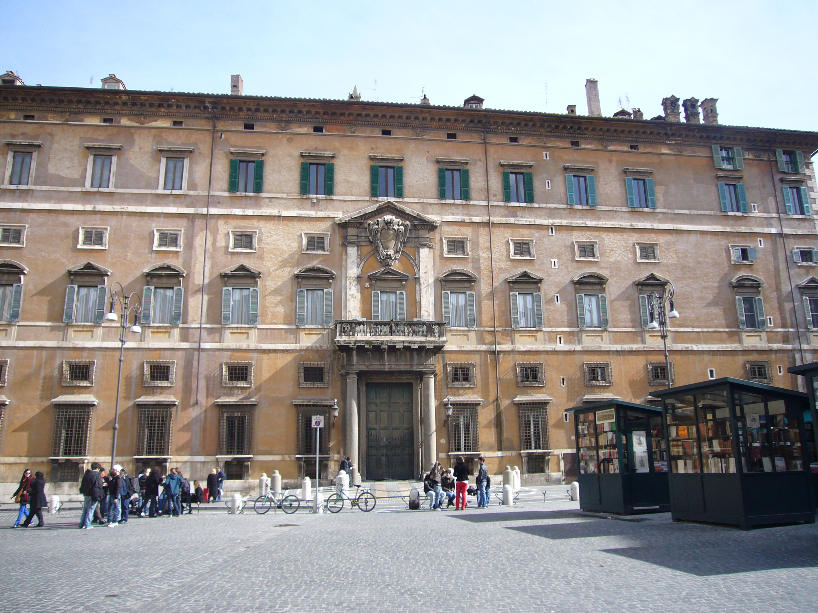 Roma, palazzo Borghese - lato sulla piazza